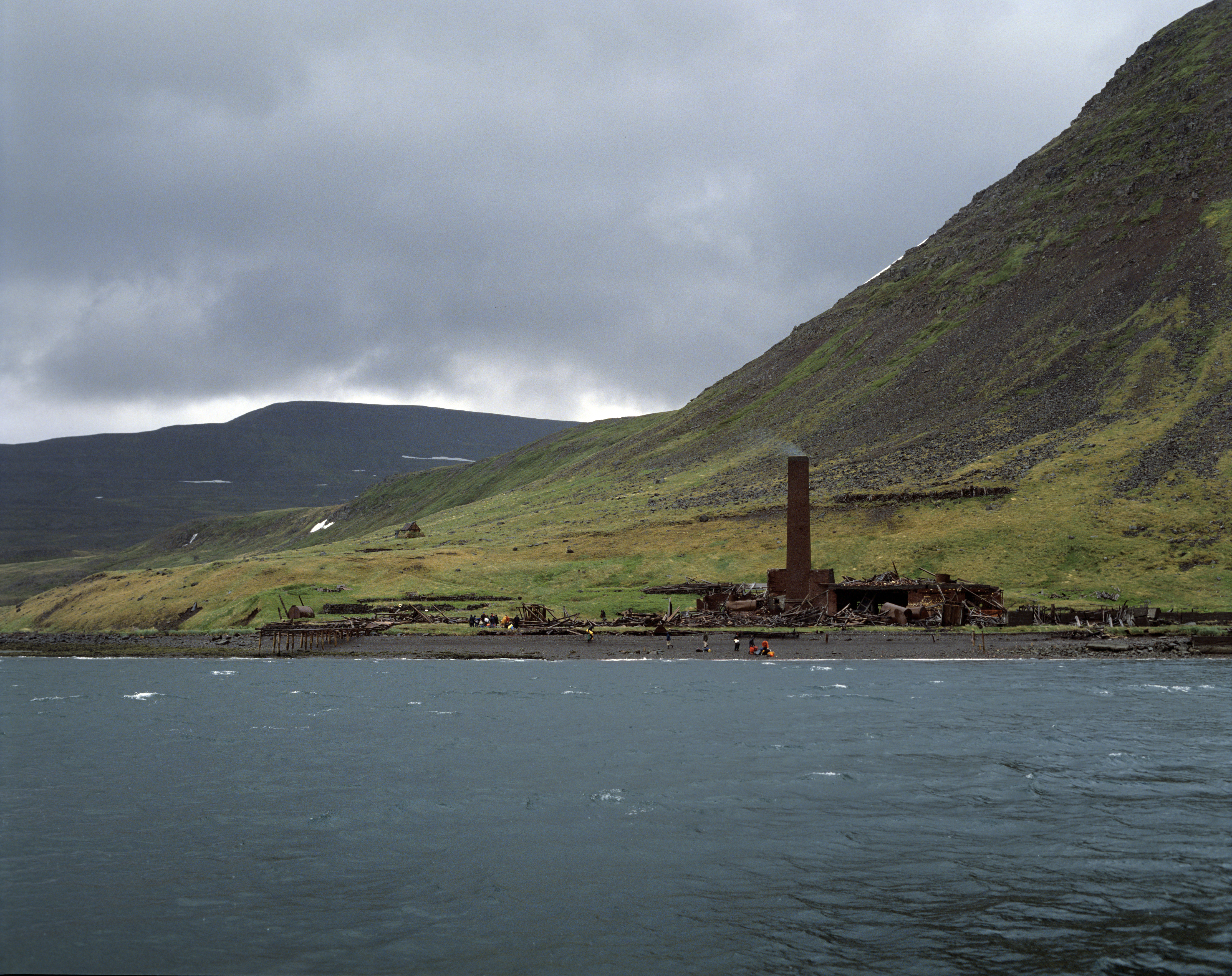 Hesteyrarfjörður, ein Seitenarm des Ísafjörðurdjúp